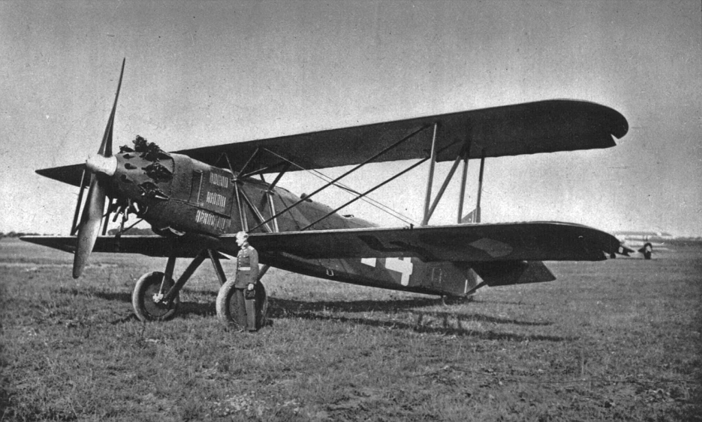 Letoun Letov Š-216 s motorem Walter Jupiter VIII, škpt. Kalla vítěz "závodu kolem Malé dohody a Polska" (1928)